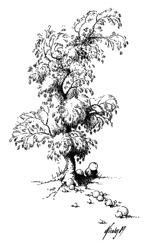 Nicolas Križan, baksidesbilden för samlingshäftet Lillen komplett (1985).